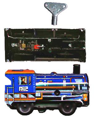 Spielzeuglokomotive mit Uhrwerkmotor